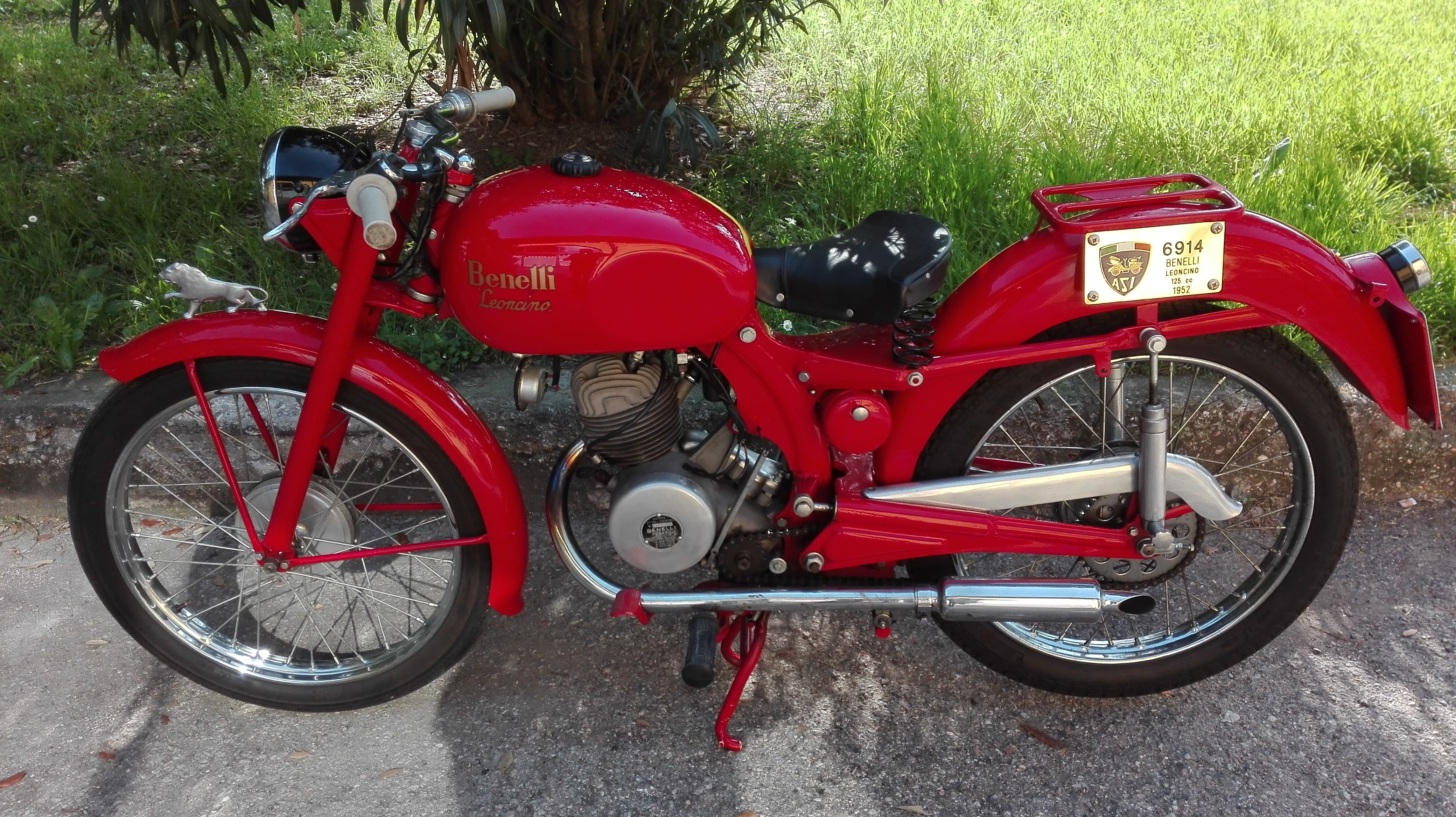 Motoleggera Benelli Leoncino 125cc. 2 tempi del 1952